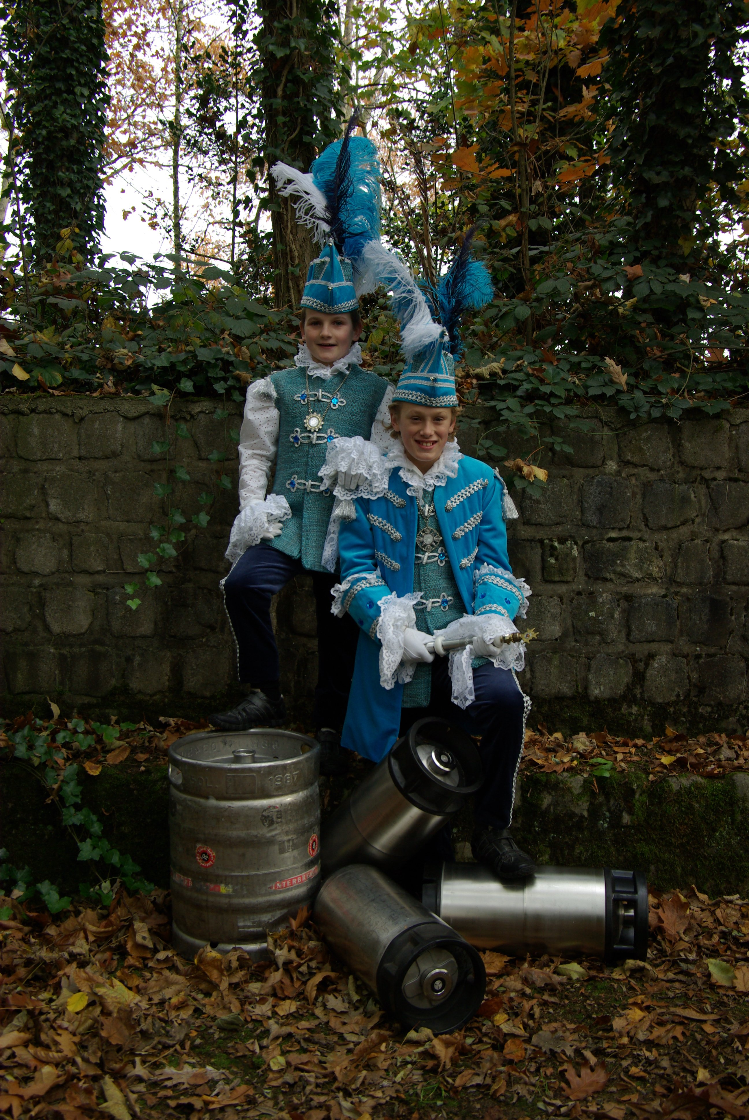 Prins Stan